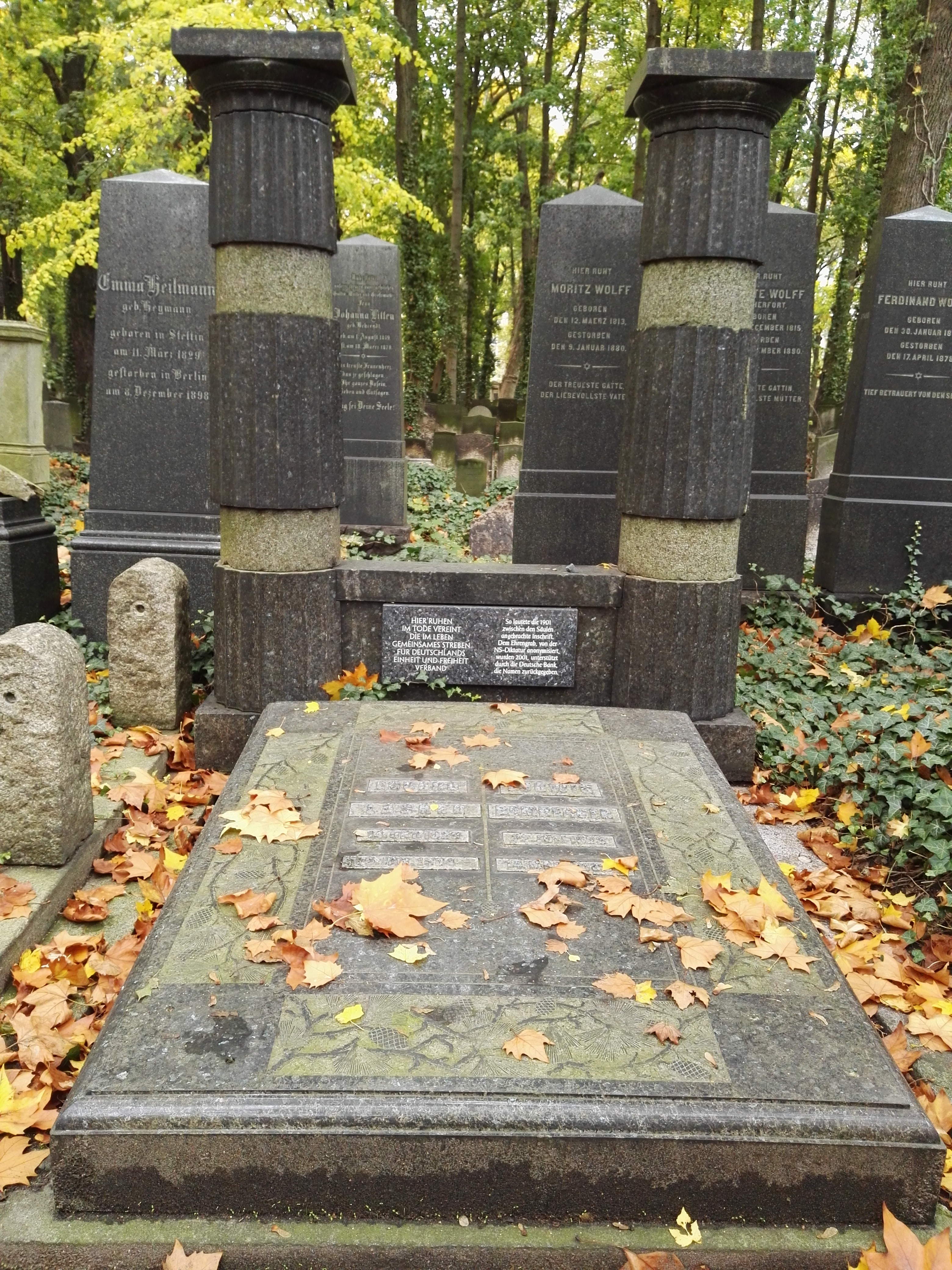 Grab von Eduard Lasker und Ludwig Bamberger auf dem Jüdischer Friedhof Schönhauser Allee in Berlin-Prenzlauer Berg